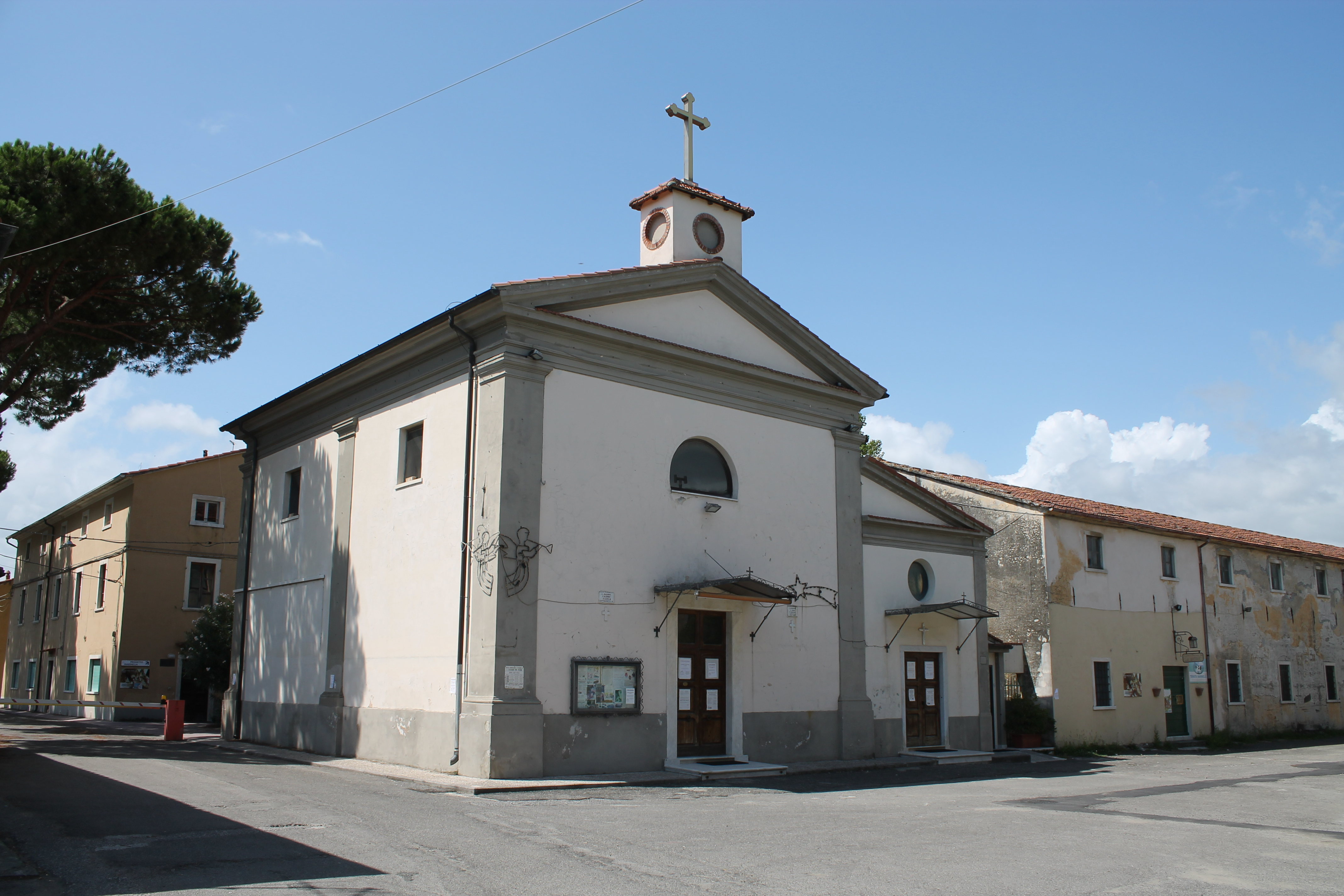 19038 Marinella di Sarzana SP, Italy